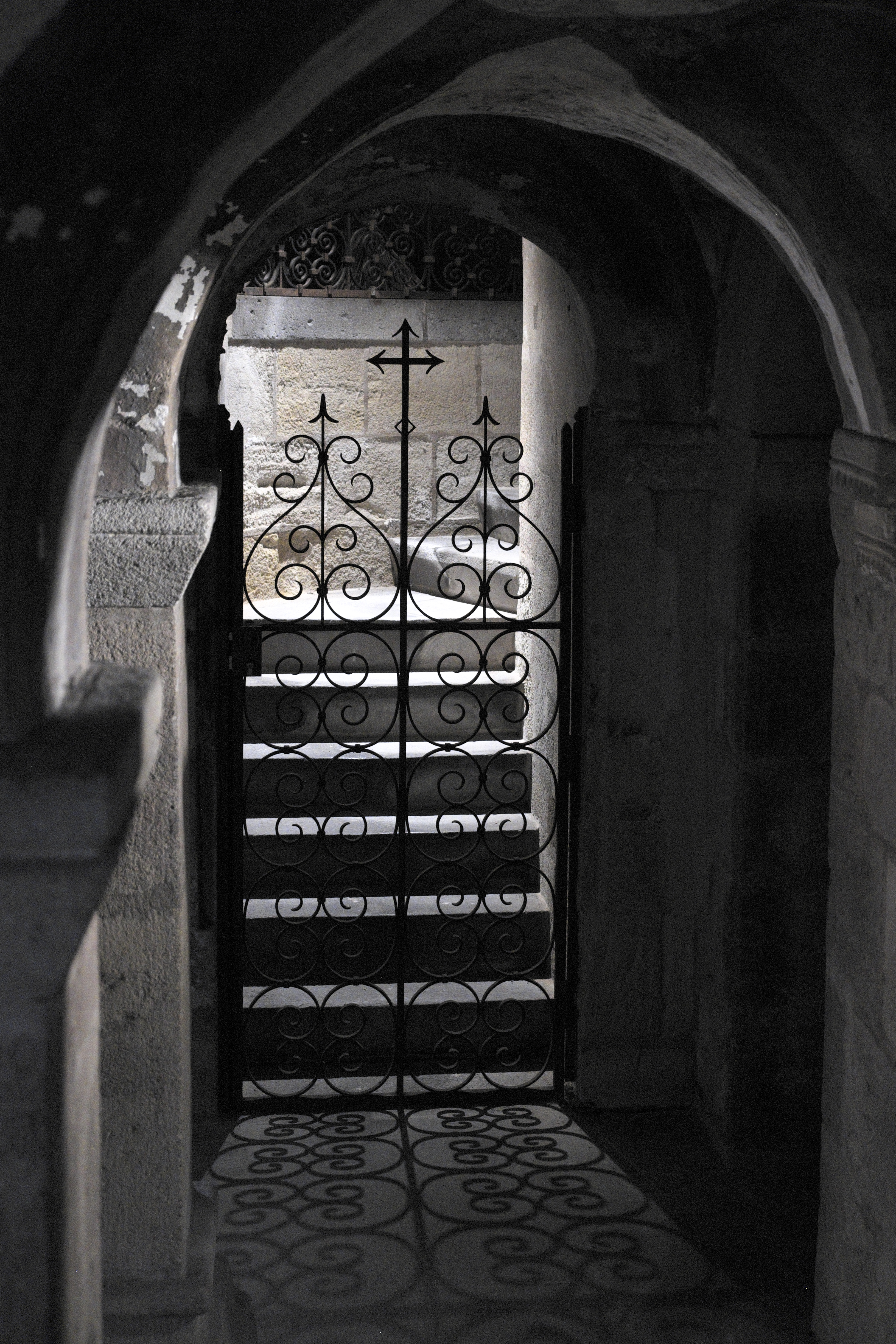 Katholische Kirche Saint-Pierre in Yzeure im Département Allier (Auvergne-Rhône-Alpes/Frankreich), Krypta